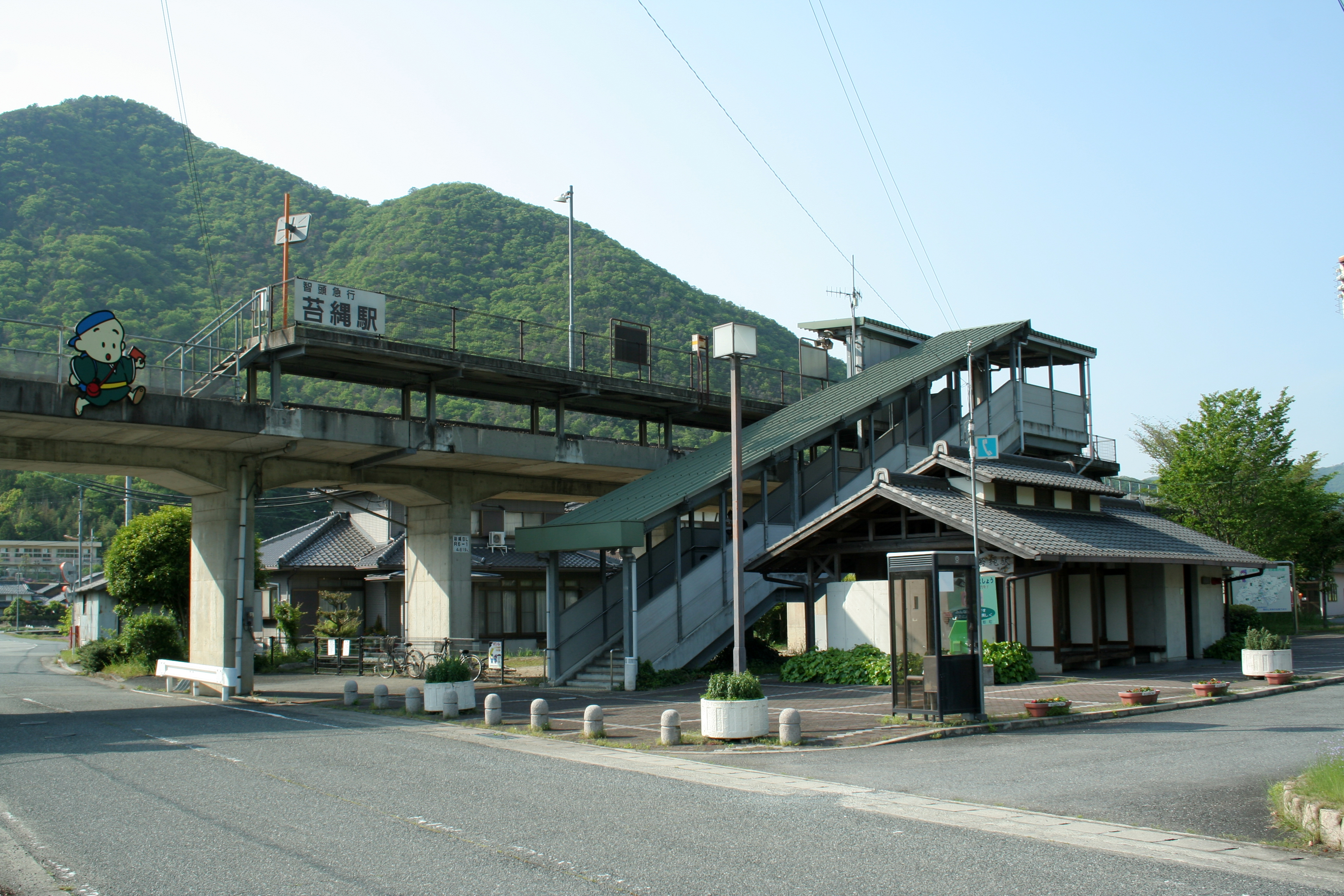 苔縄駅とその付近の写真。 東側から見た苔縄駅。